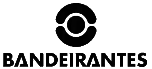 Logomarca da Band em 1967